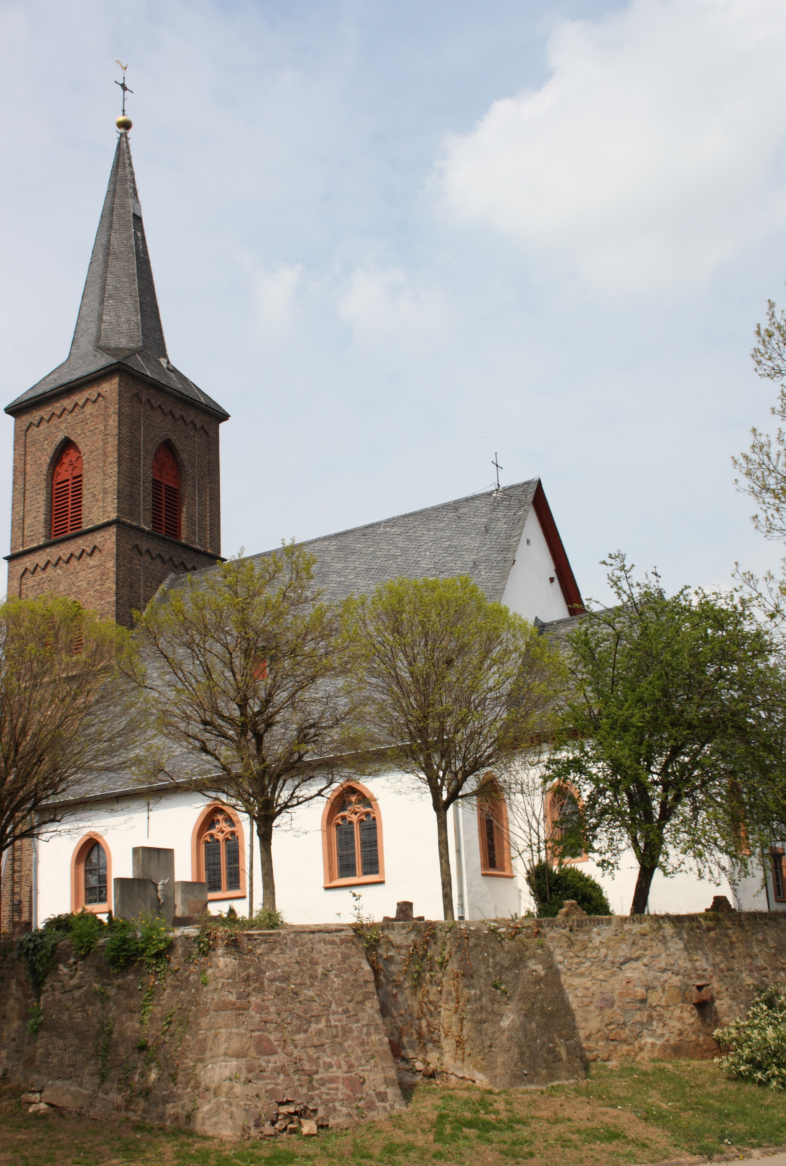 katholische Pfarrkirche Kreuzauffindung in Elsig (Euskirchen), Außenansicht